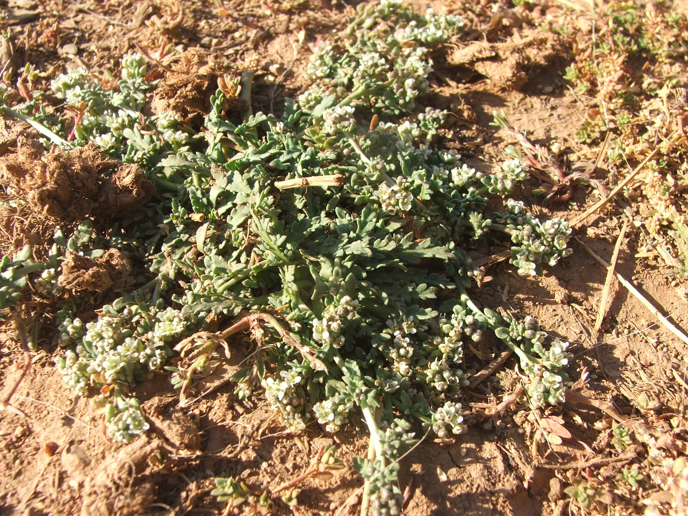 Fotografía de Coronopus navasii, hierba perenne de la familia Brassicaceae, tomada en Sierra de Gádor, provincia de Almería, Andalucía, España.